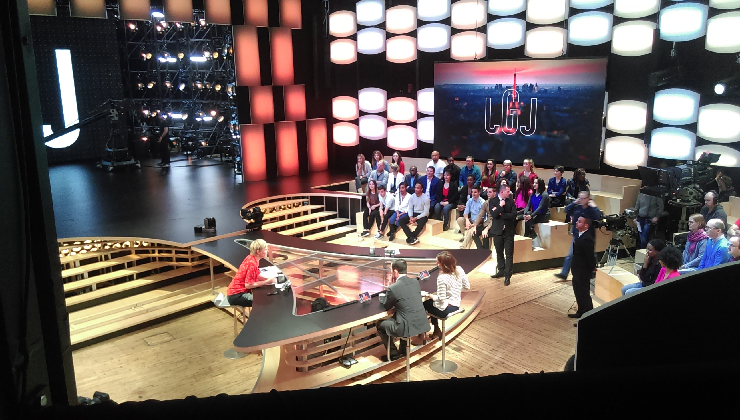 Le plateau du "Grand journal" en mars 2016 (Canal Factory).